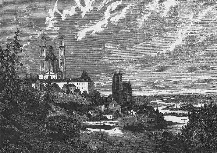 Беларуская (тарашкевіца): Полацак (Połacak), вуліца Вялікая (vulica Vialikaja)